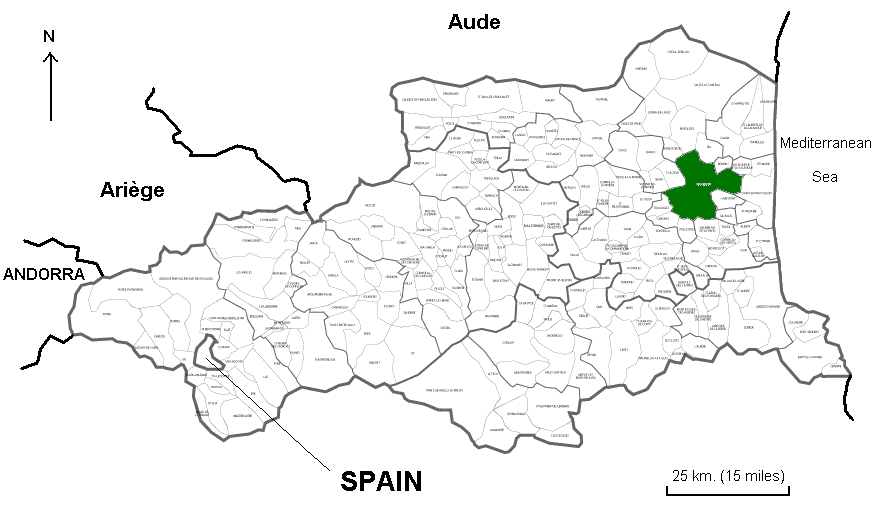 Perpinyà al departament dels Pirineus Orientals